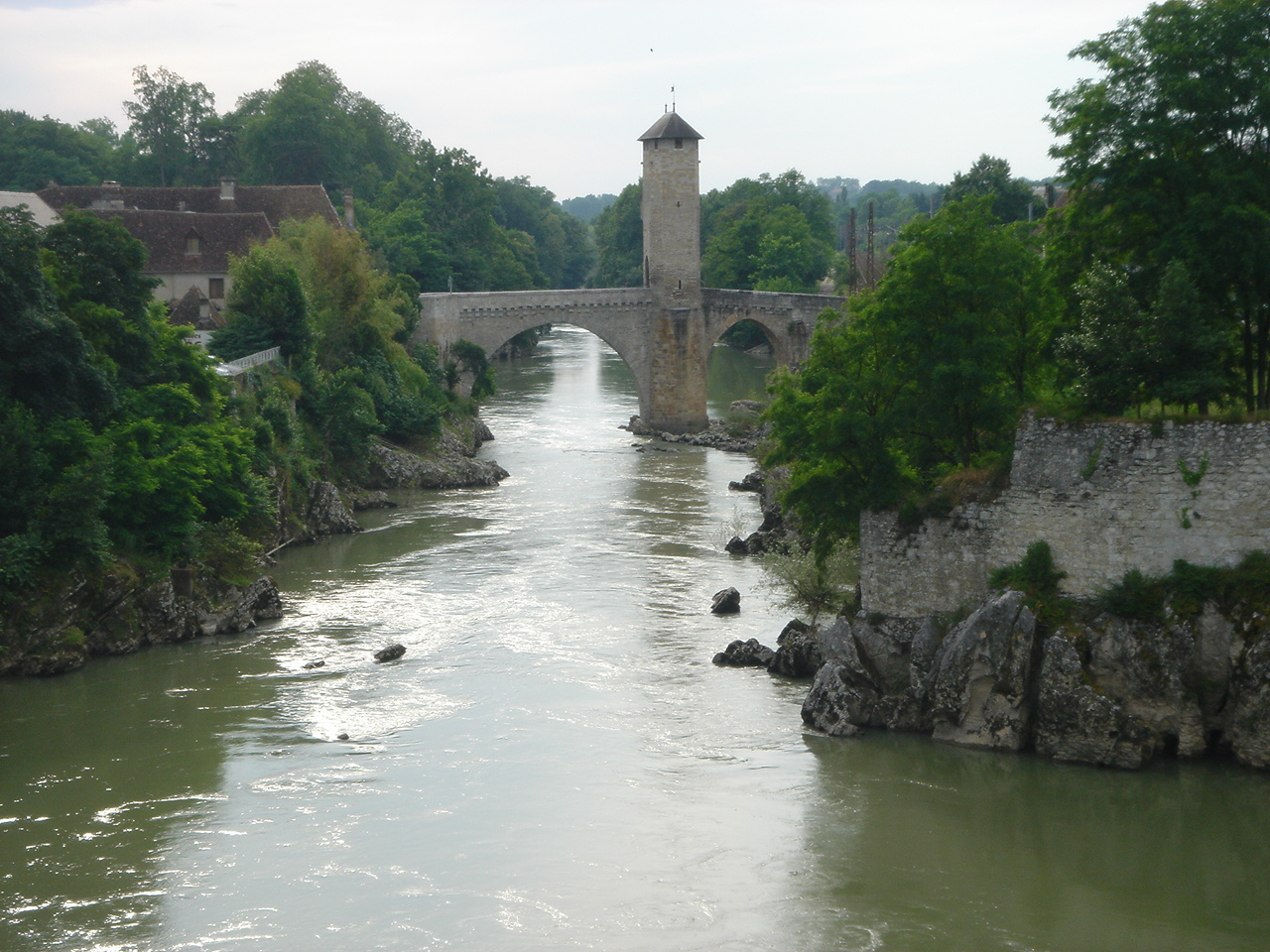 Orthez (Gave de Pau)